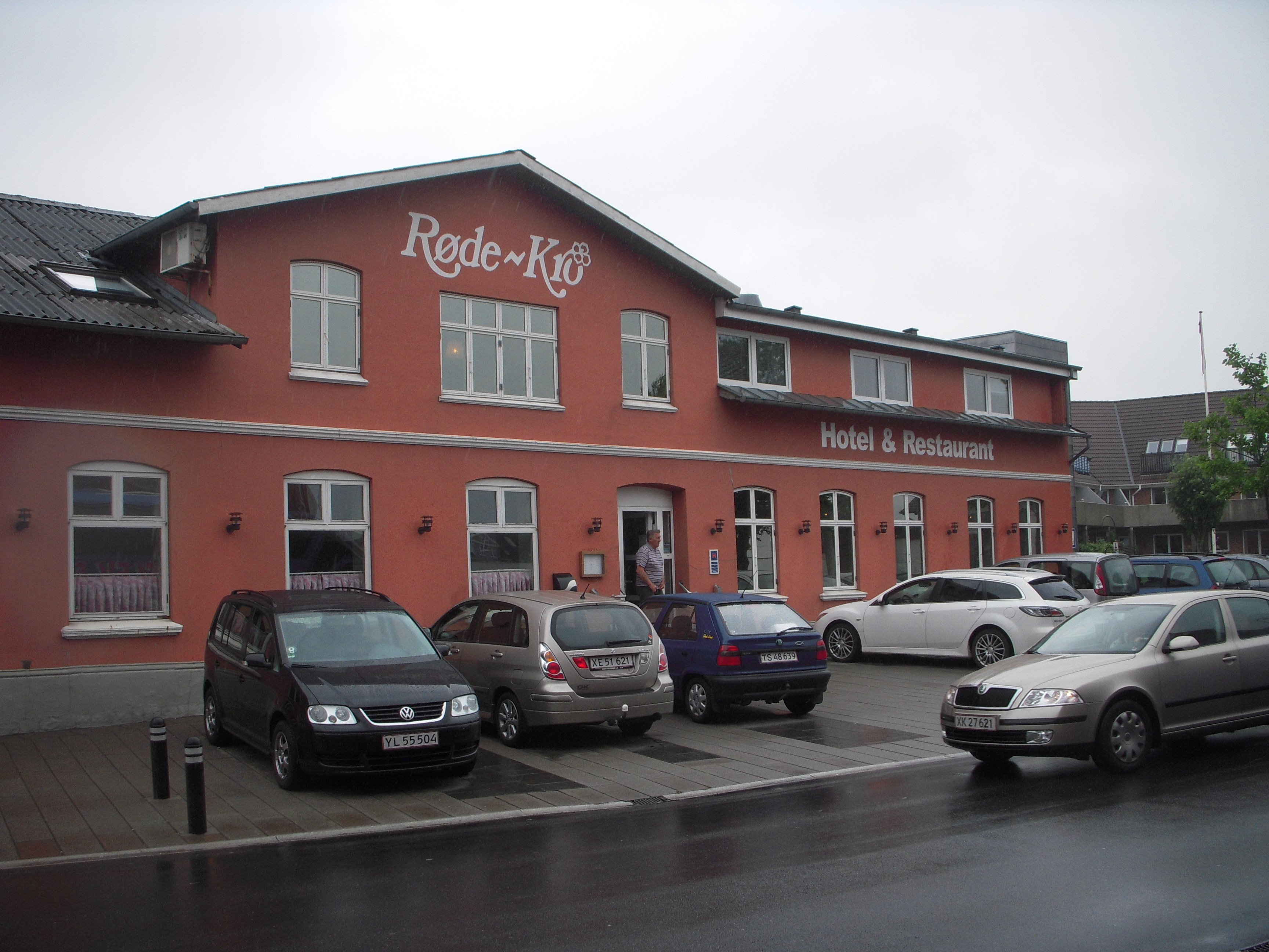 Røde Kro i Rødekro, Sønderjylland. Juni 2013